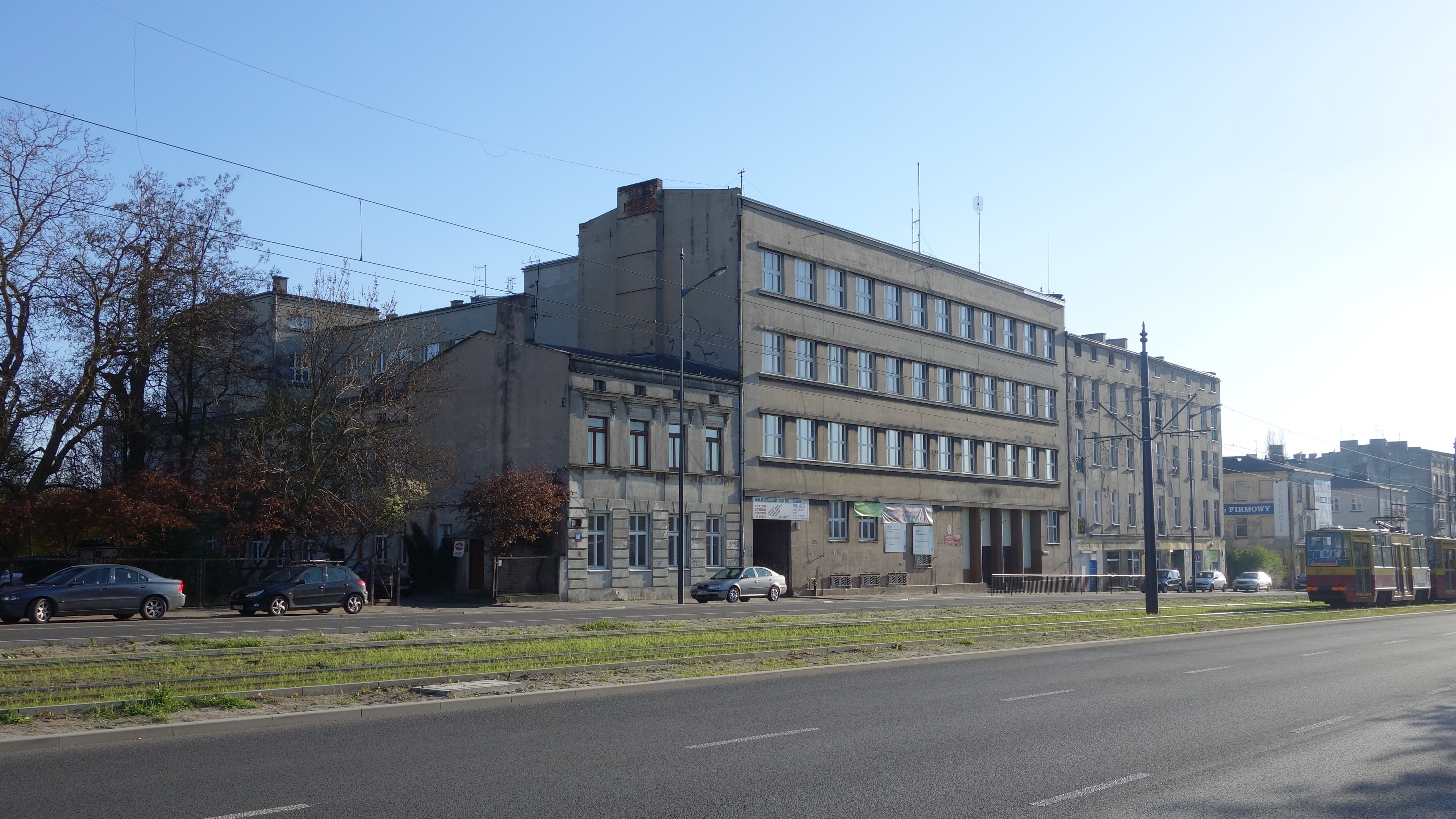 Grundschule Nr. 4 (Szkoła Podstawowa) der Stadt Łódź in der heutigen Aleja Józefa Piłsudskiego 101 (Piłsudski-Allee); das Gebäude beherbergte während der deutschen Besatzung von 1941 bis 1944 die Günther-Prien-Schule (anfangs als Staatliche Oberschule für Jungen II bezeichnet)